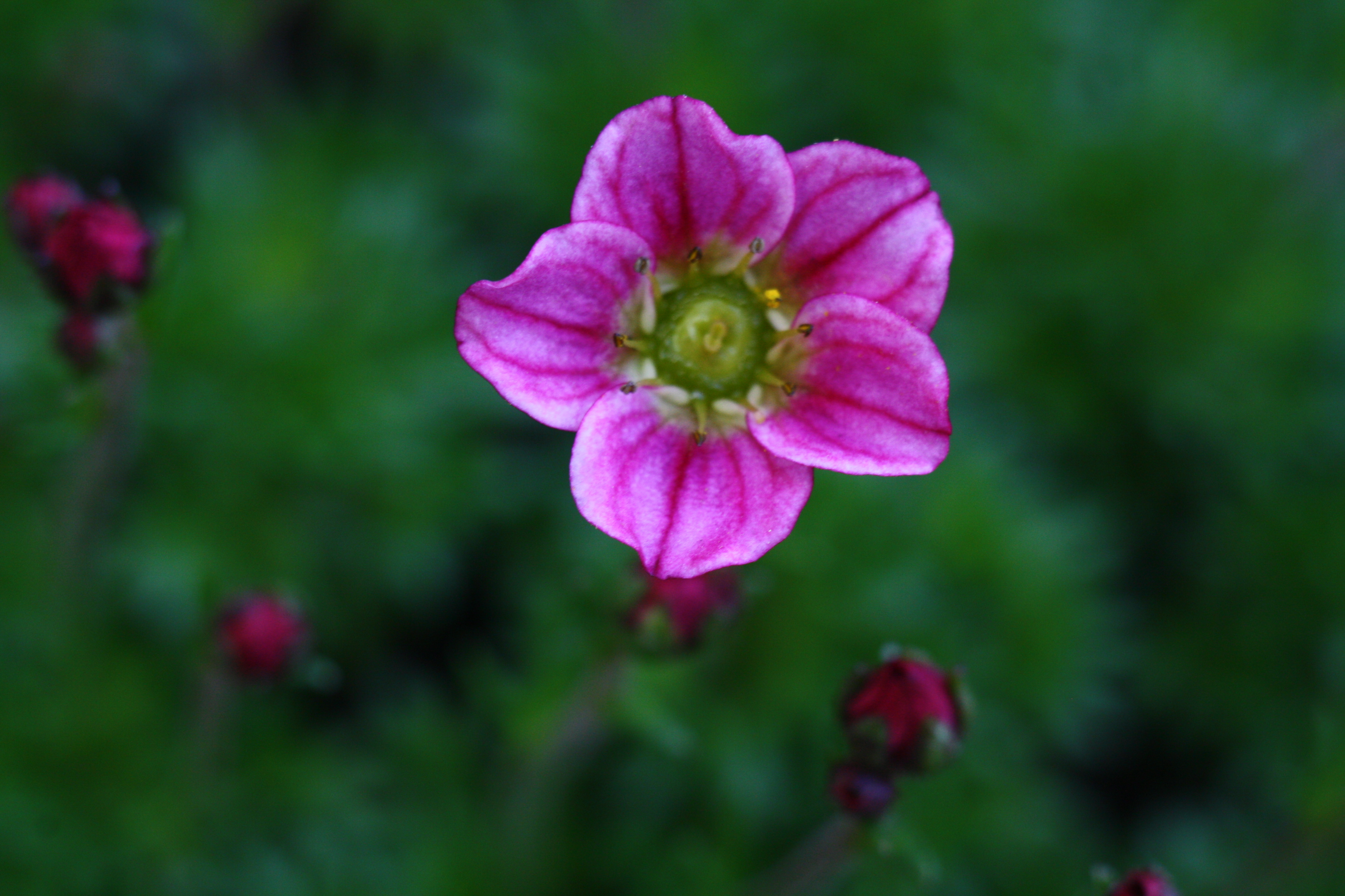 Камнеломка Арендса розовая